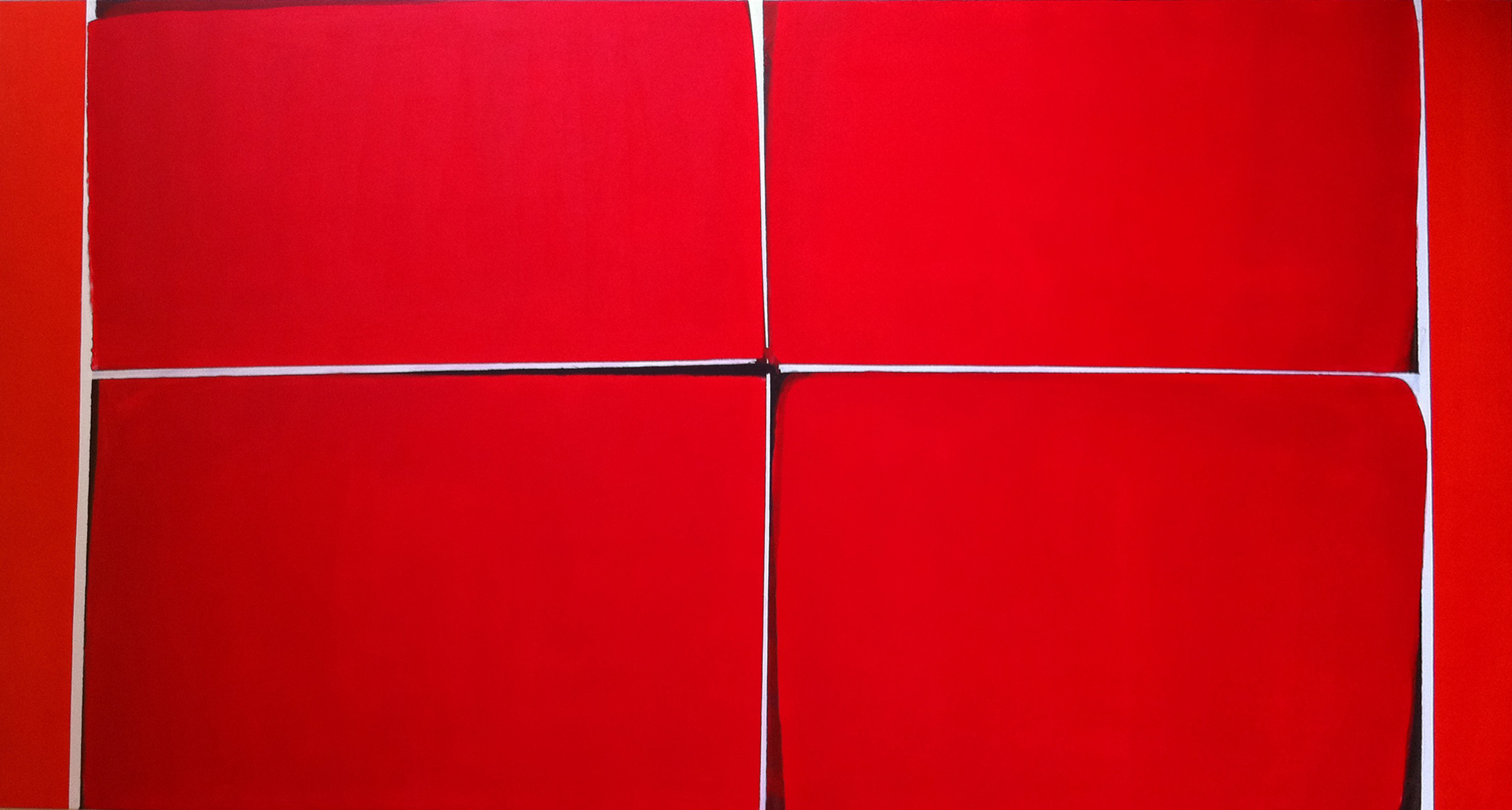 painting